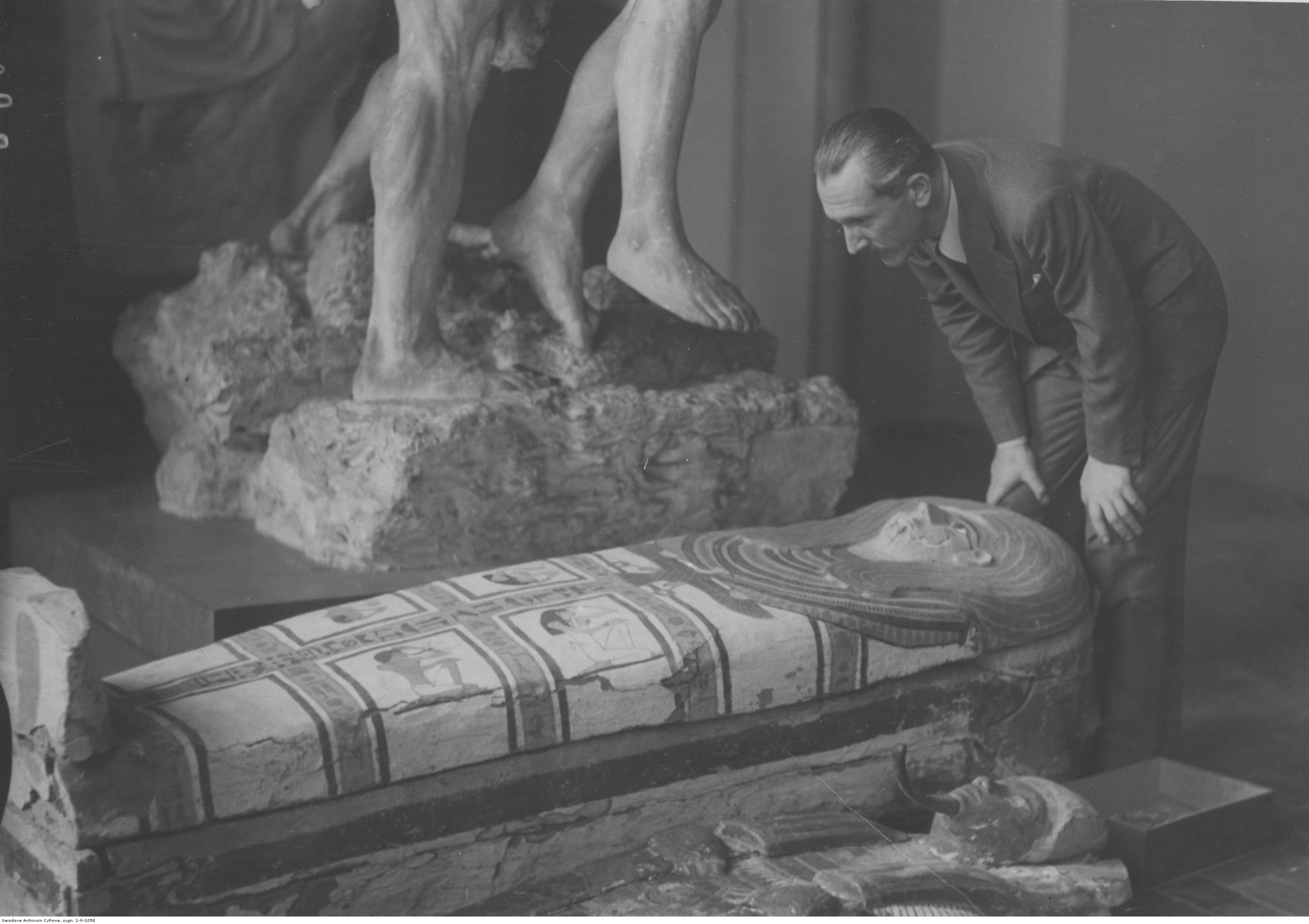 Profesor Kazimierz Michałowski podczas oględzin sarkofagu.